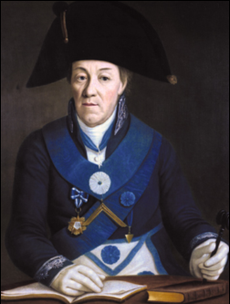 Ölgemälde als Meister vom Stuhl